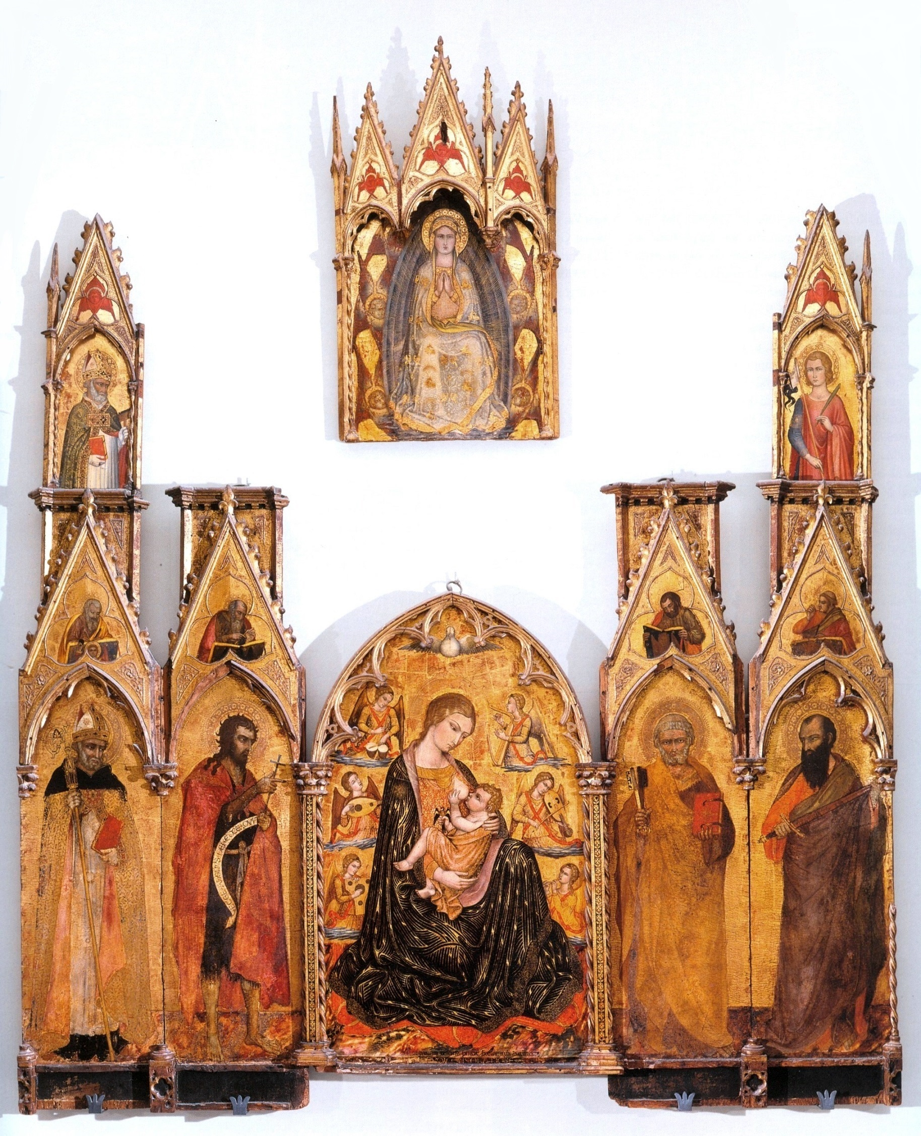 Polyptych Tolomei